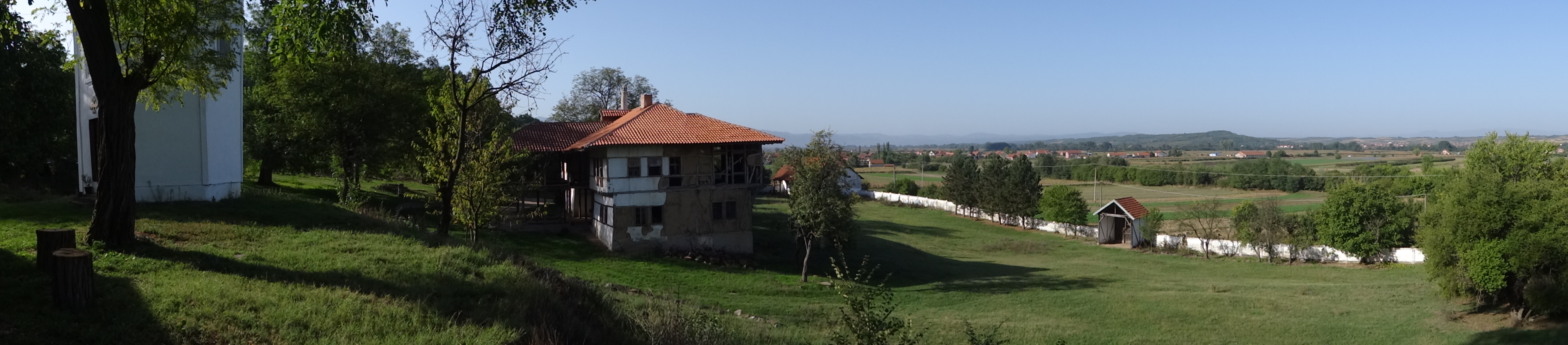 Rudare, Leskovac